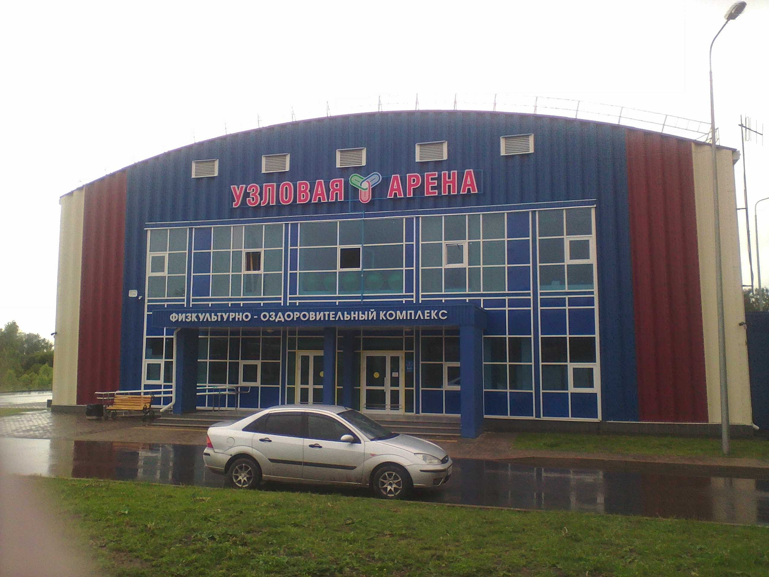 Физкультурно-оздоровительный комплекс «Узловая-Арена». Открыт в 2018 году.